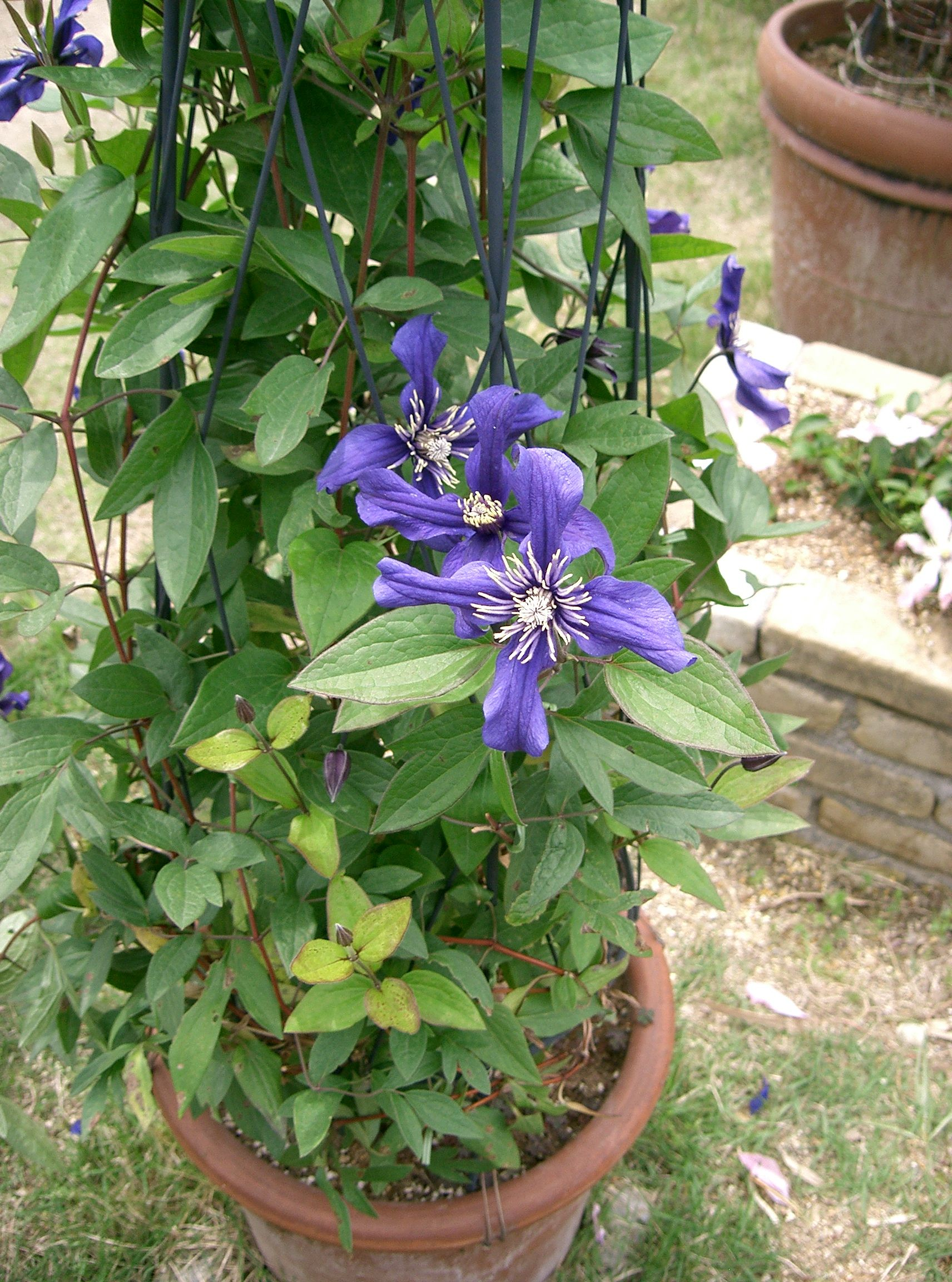 Clematis 'Evisix'